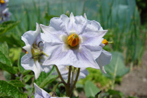 Blüte des “Blauen Schweden”